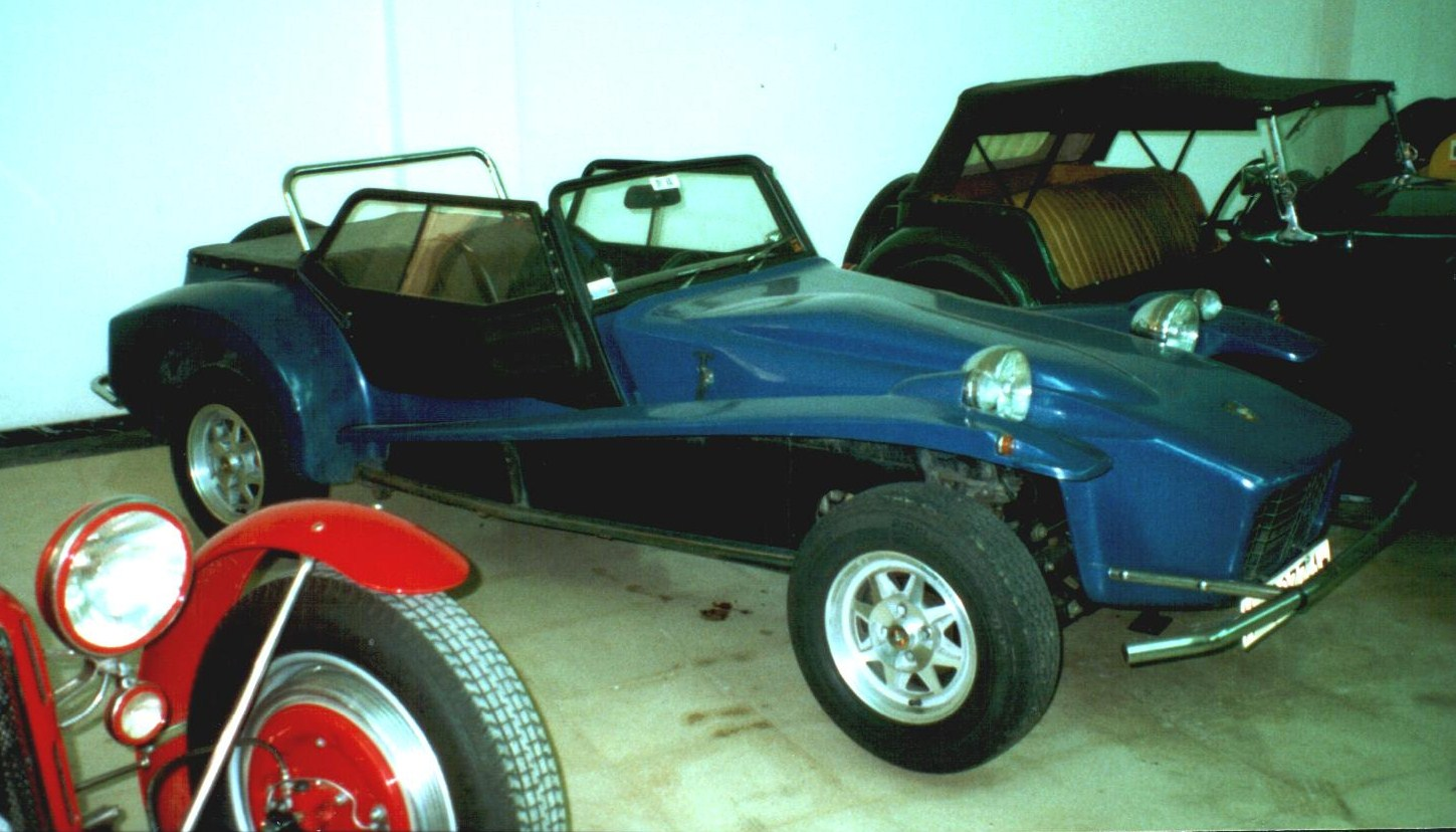 Hispano-Alemán 1972-1976